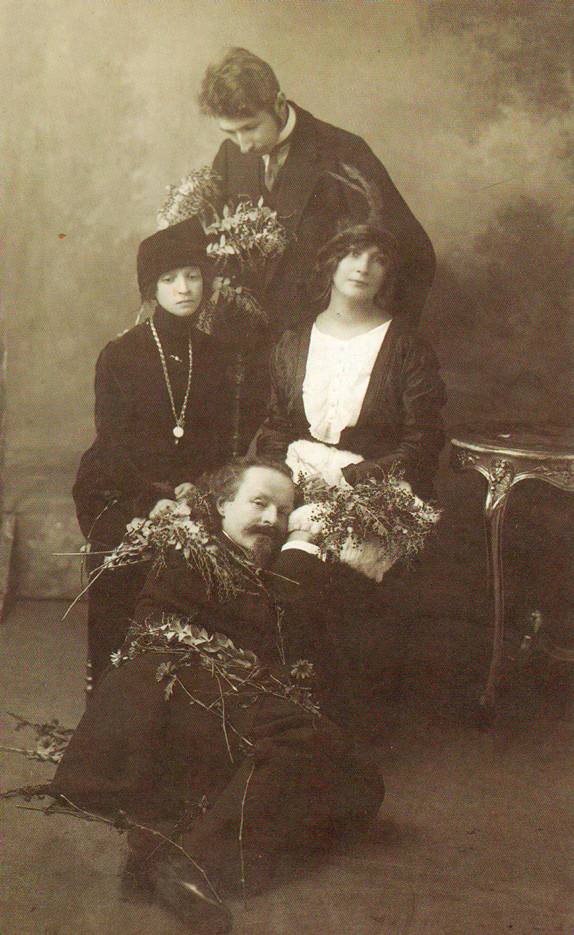 K.Balmont, S.Gorodetsky, A.Gorodetskaya, E.Tsvetkovskaya